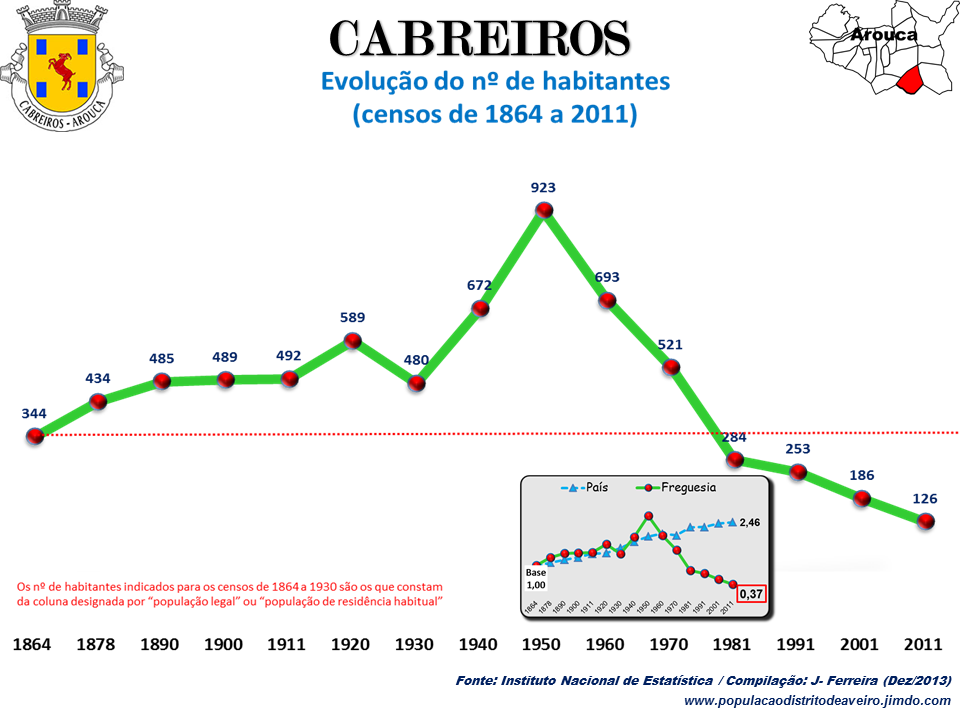 Evolução da População 1864 / 2011